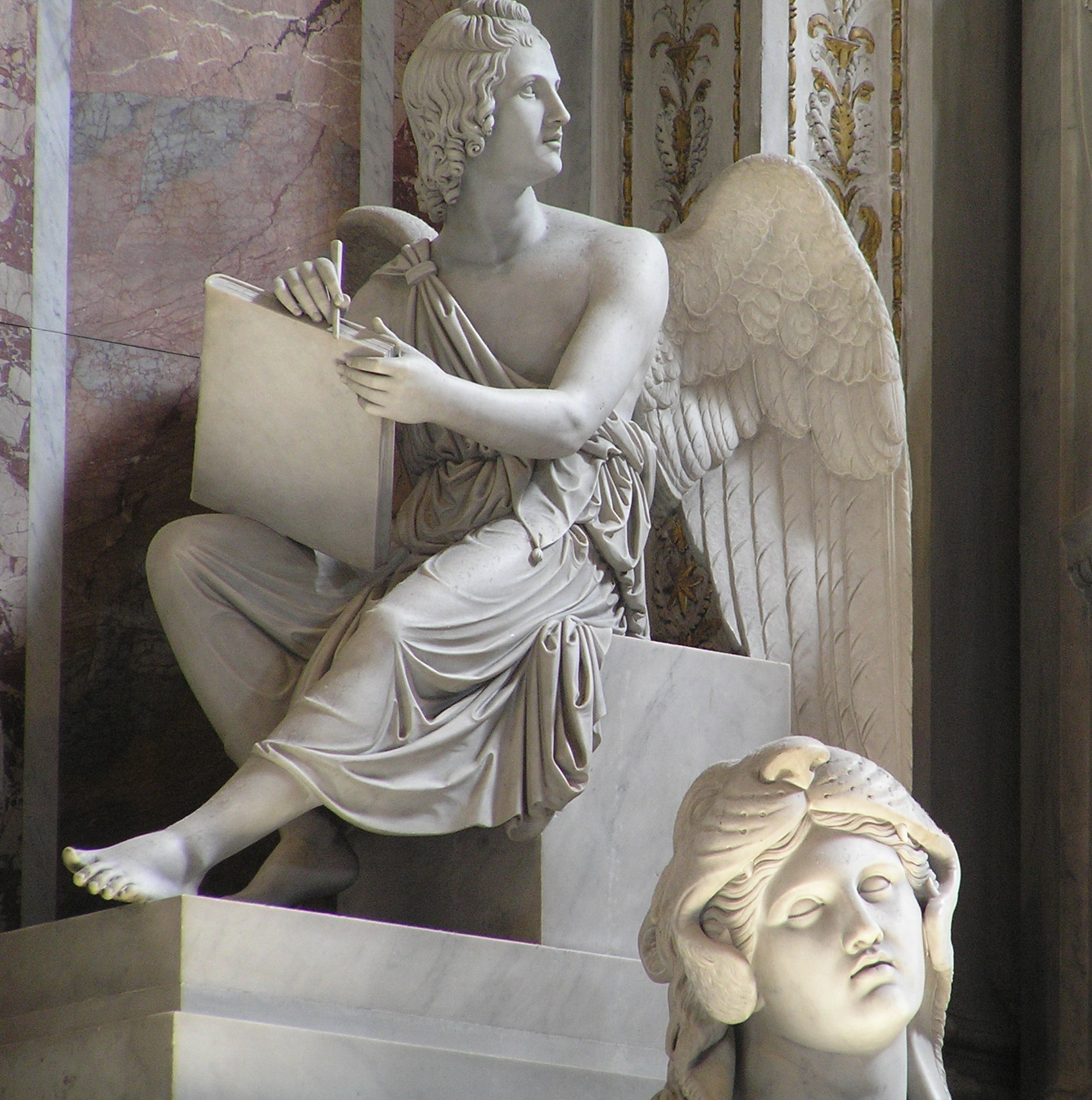 Particolare della tomba di Pio VII Chiaramonti, collocata nella Cappella Clementina nella Basilica di S. Pietro in Vaticano a Roma e realizzata da Bertel Thorvaldsen. Sono io l'autore della foto e la cedo in pubblico dominio rinunciando a tutti i diritti.